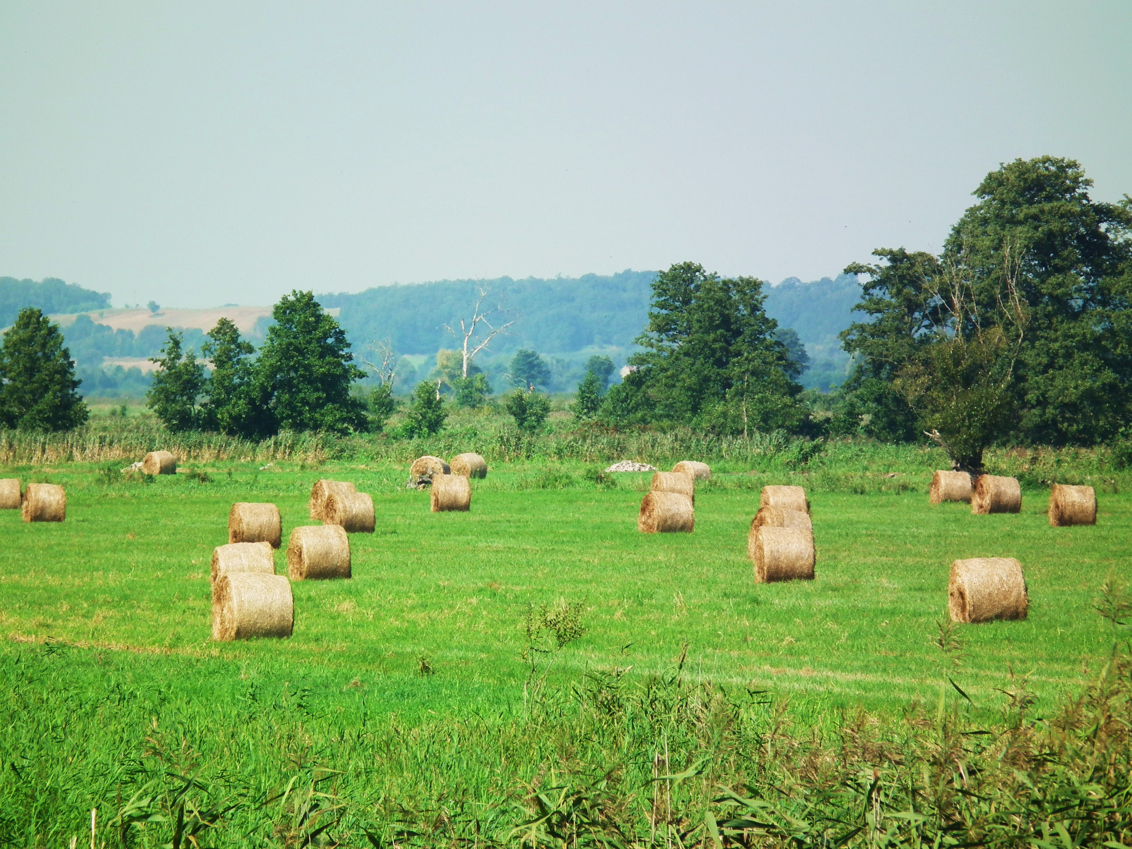 Warta w rejonie Kłopotowa - błota nadwarciańskie.